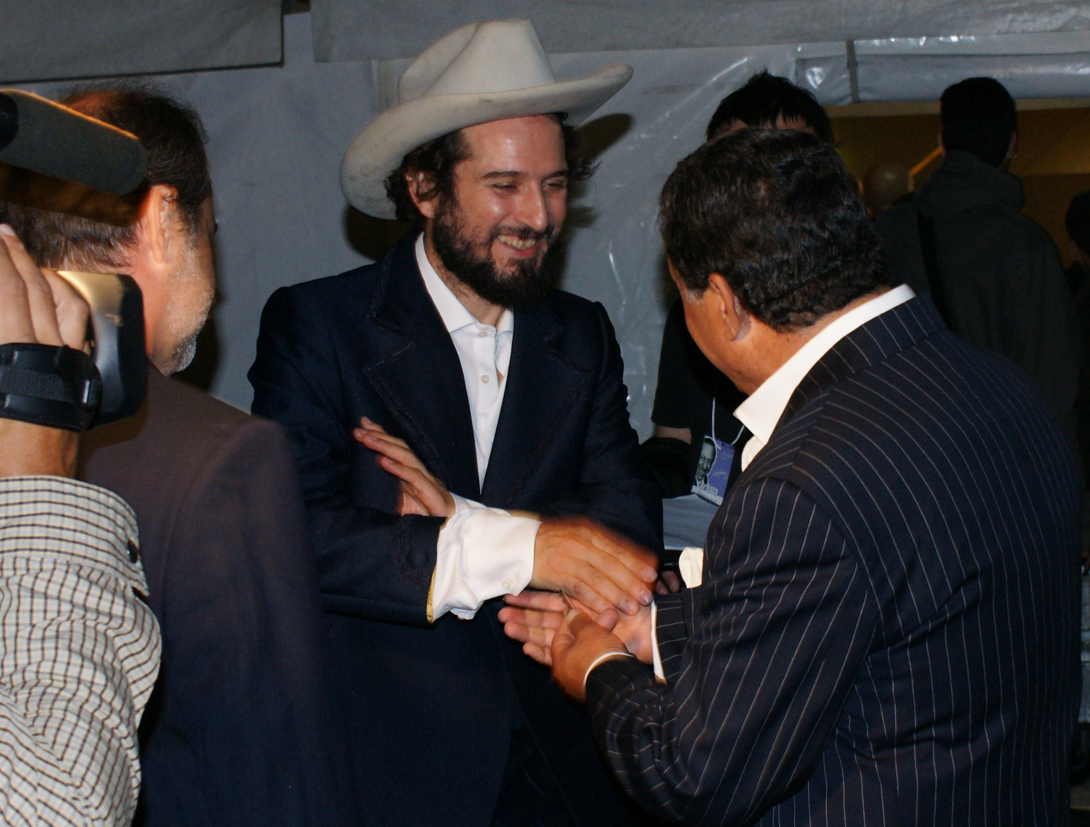 Vinicio Capossela e Mario Trevi all'ottava edizione del Premio Carosone. 24.9.2009